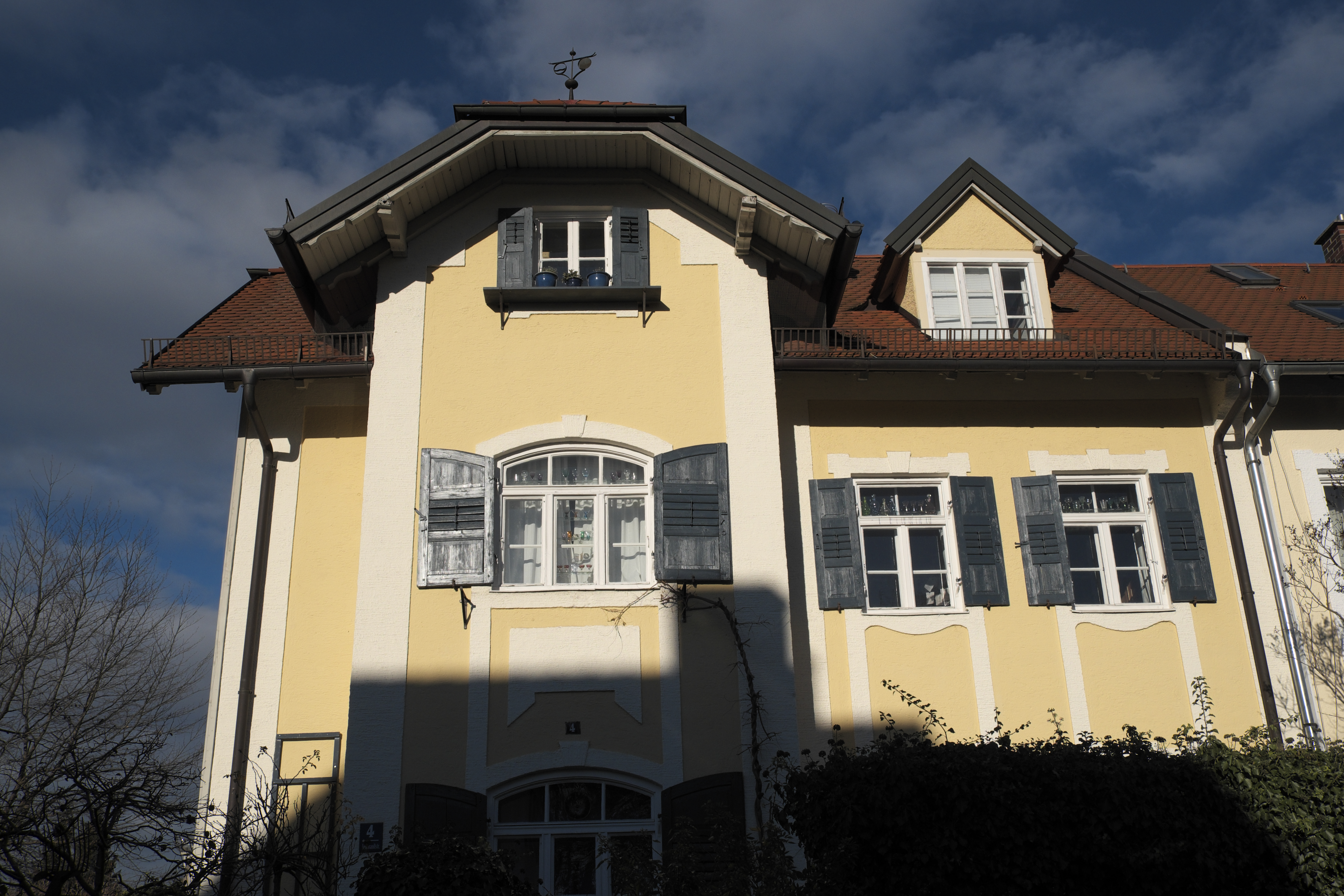 Doppelhaushälfte in der Rembrandtstraße 4 in Pasing im Stadtbezirk Pasing-Obermenzing in München (Bayern/Deutschland), 1904 von Patriezius Sewald errichtet